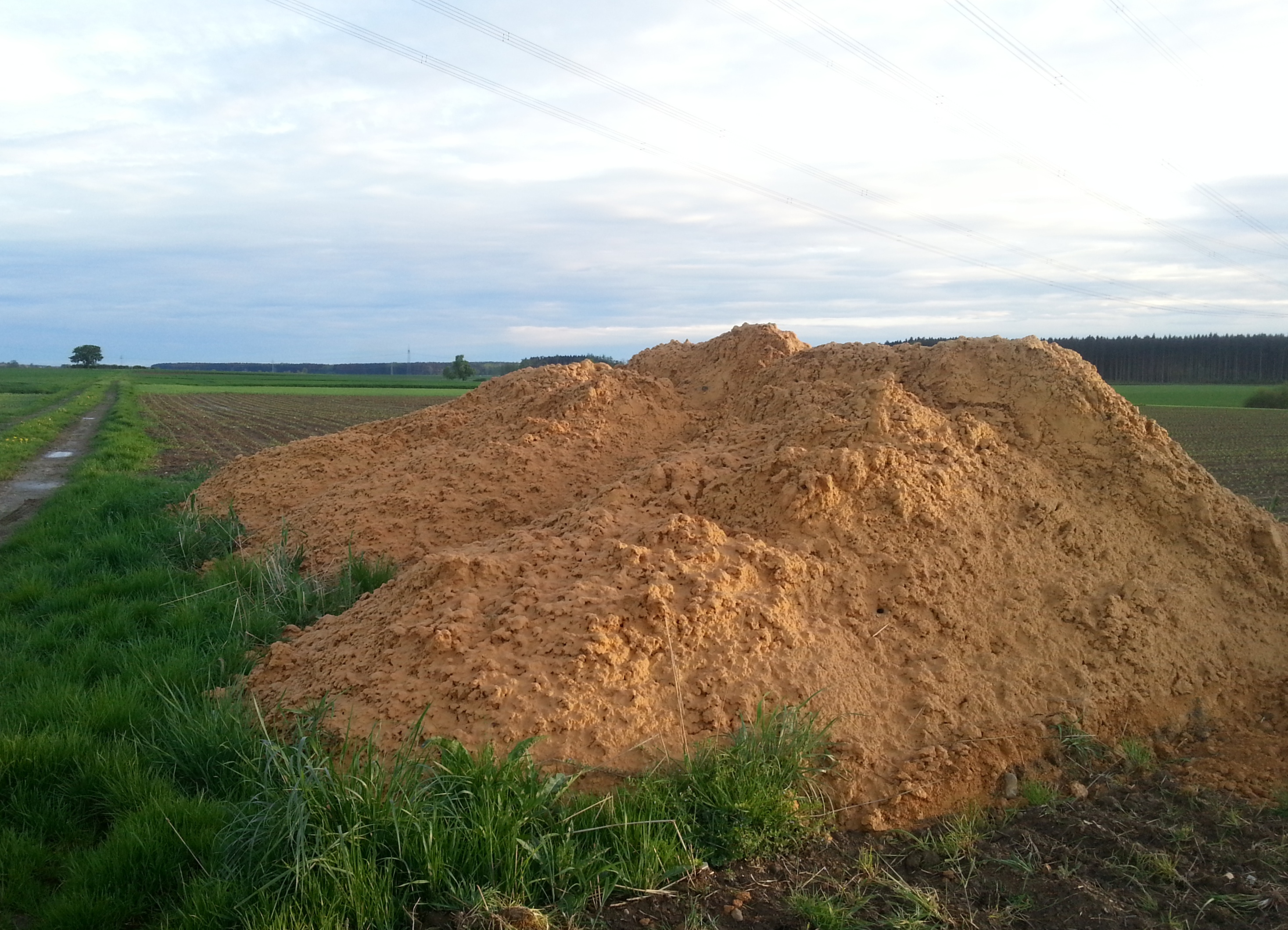 Donaukalk auf landwirtschaftlichen Flächen im Landkreis Günzburg